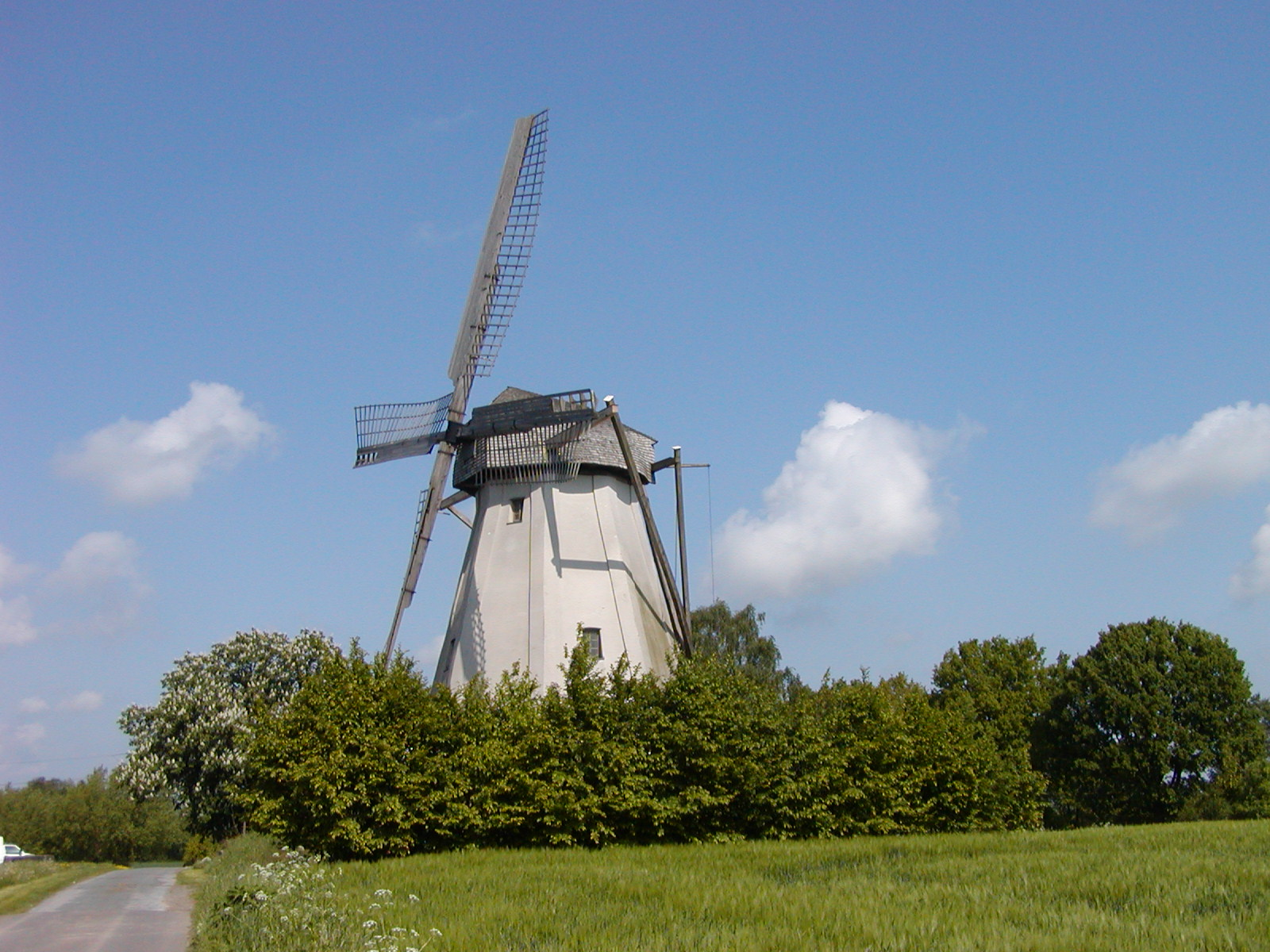 Windmühle Großenheerse Sonstiges